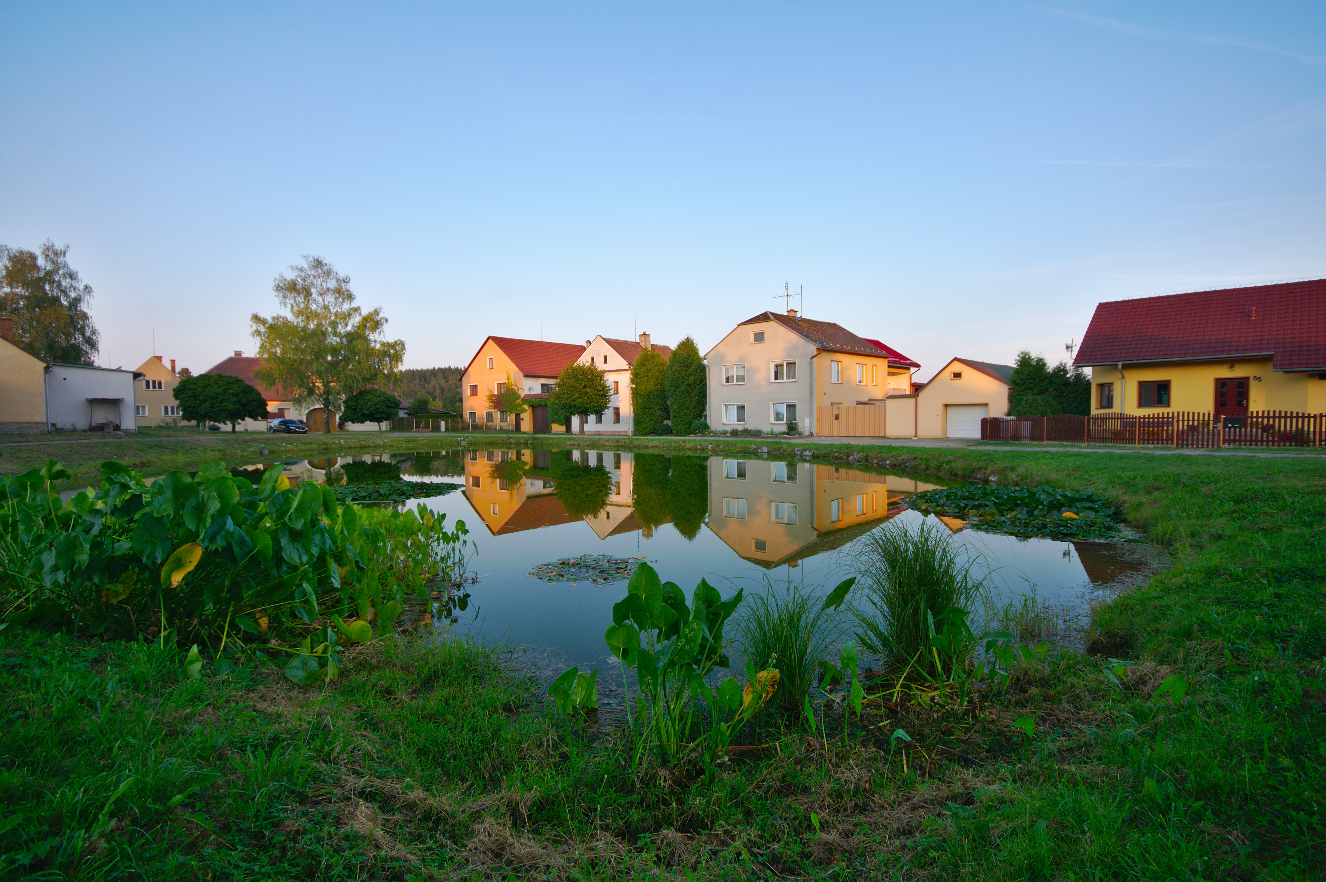 Rybník na návsi, Pavlov, okres Šumperk